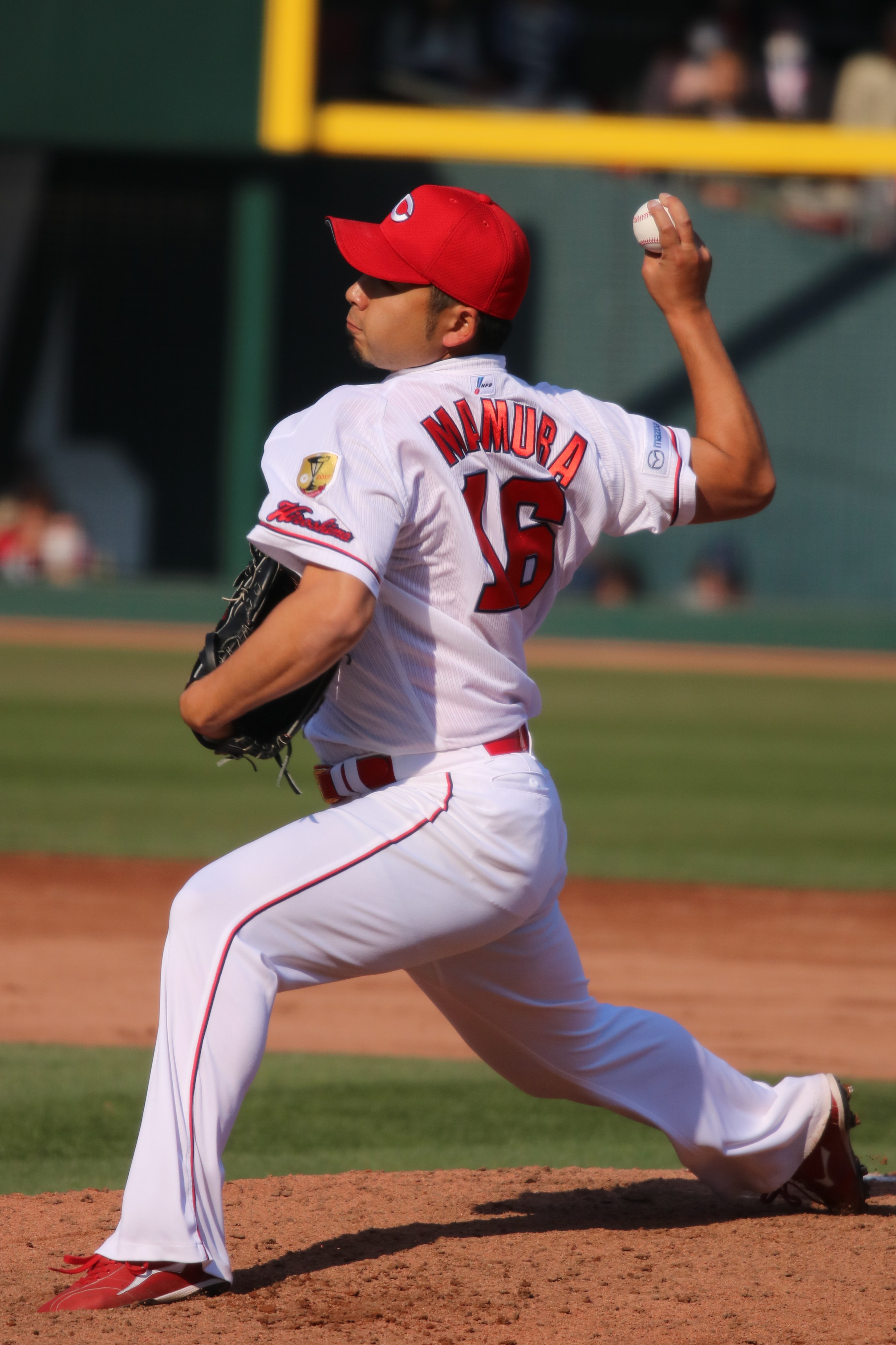 2018年3月13日マツダスタジアム